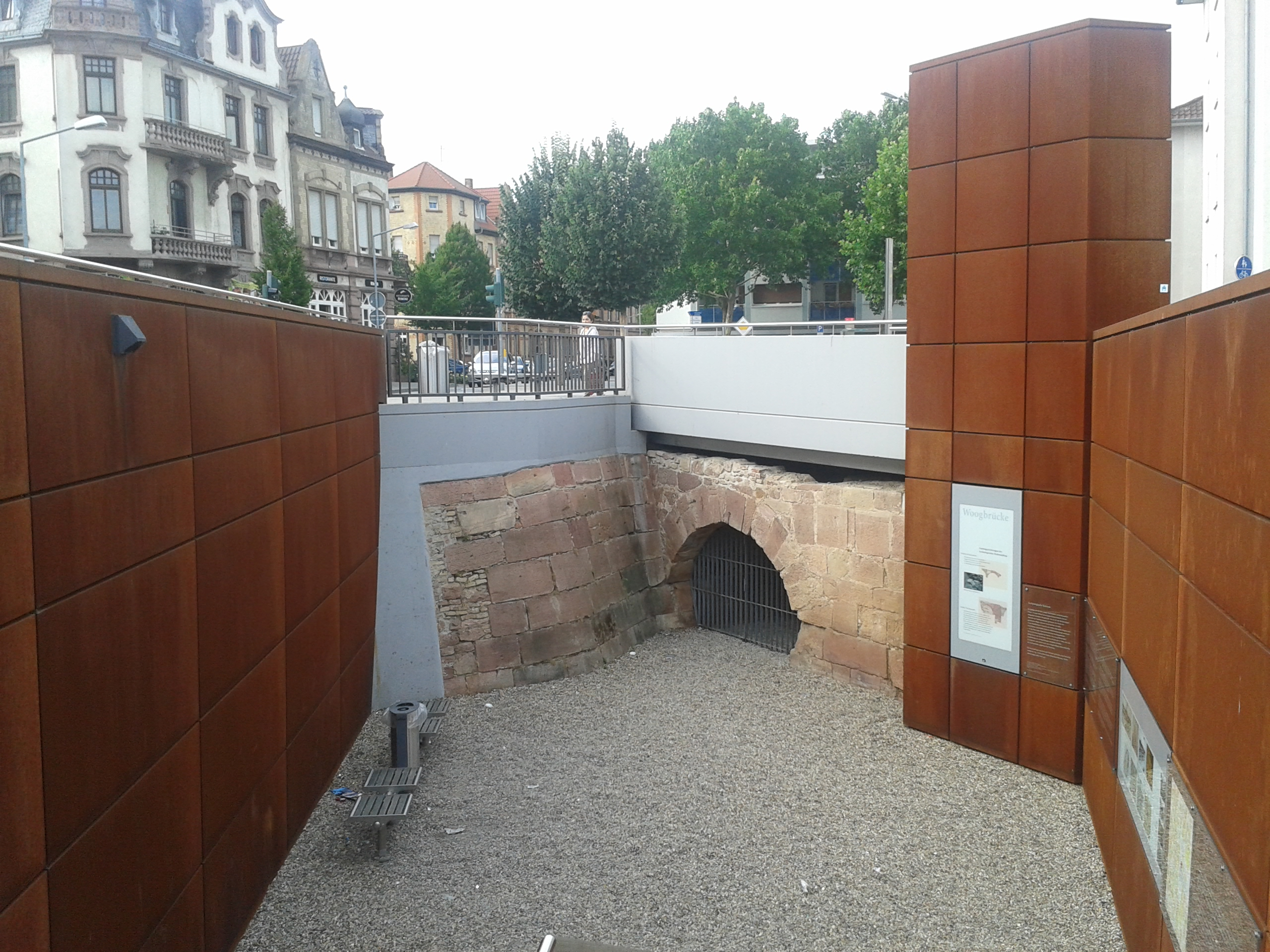 Woogbrücke Worms Total